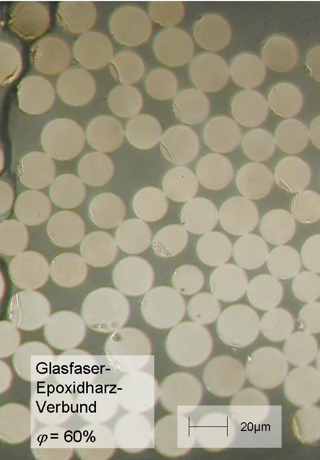 Mikroskopaufnahme eines Dünnschliffs eines Verbunds aus Glasfasern und Epoxidharz